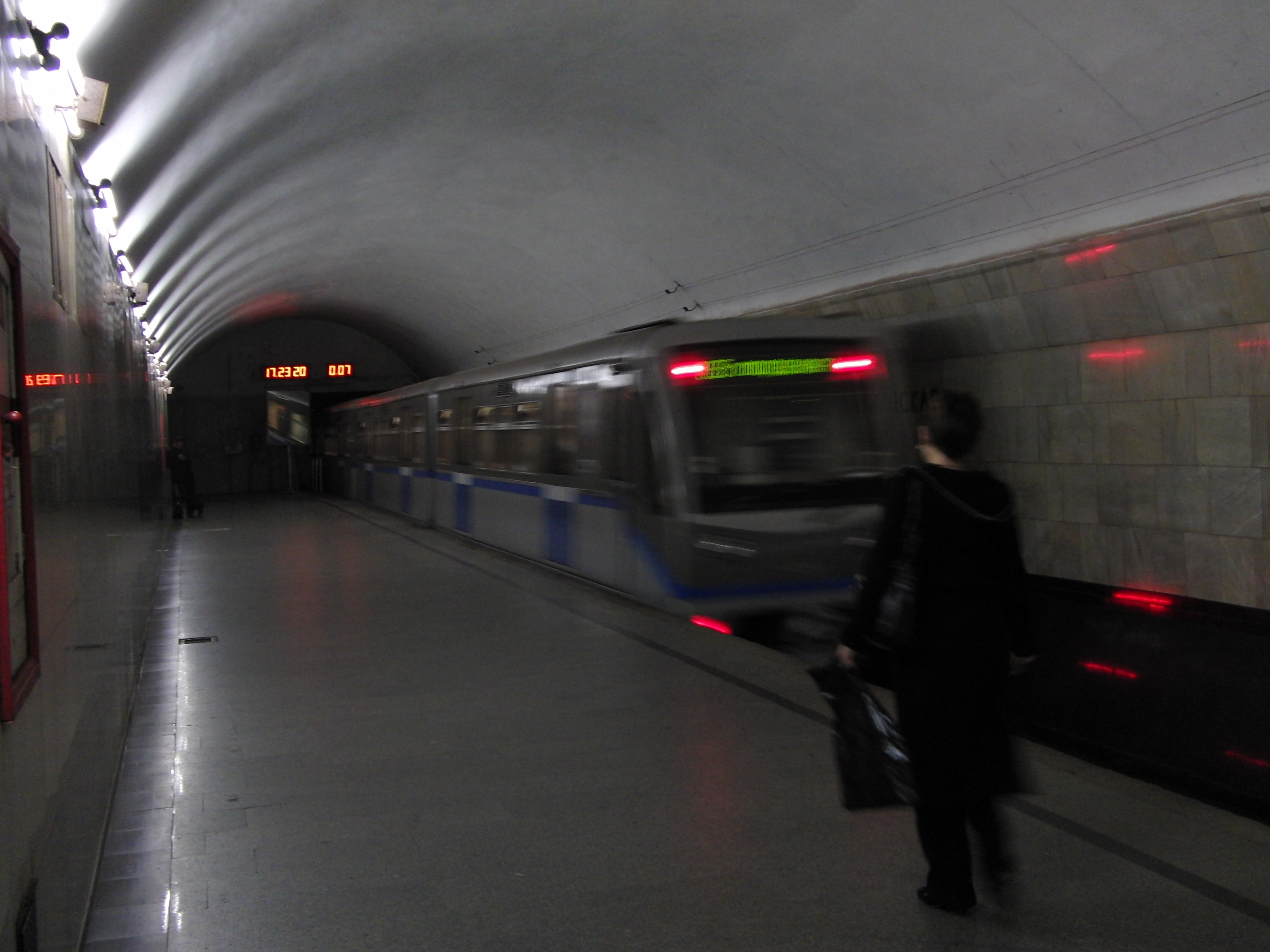 Baumanskaya (Бауманская)